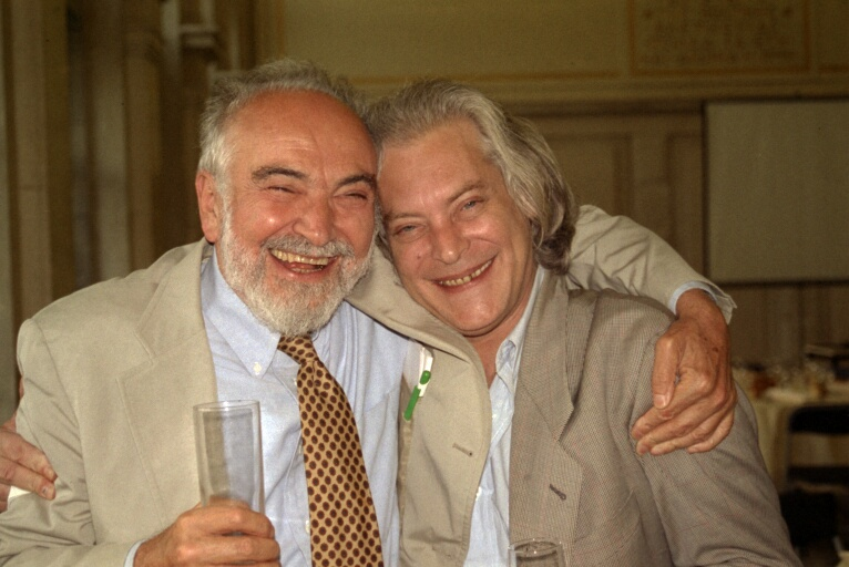 Joel Lebowitz (left) and Mitchell Feigenbaum in Brussels, 1998